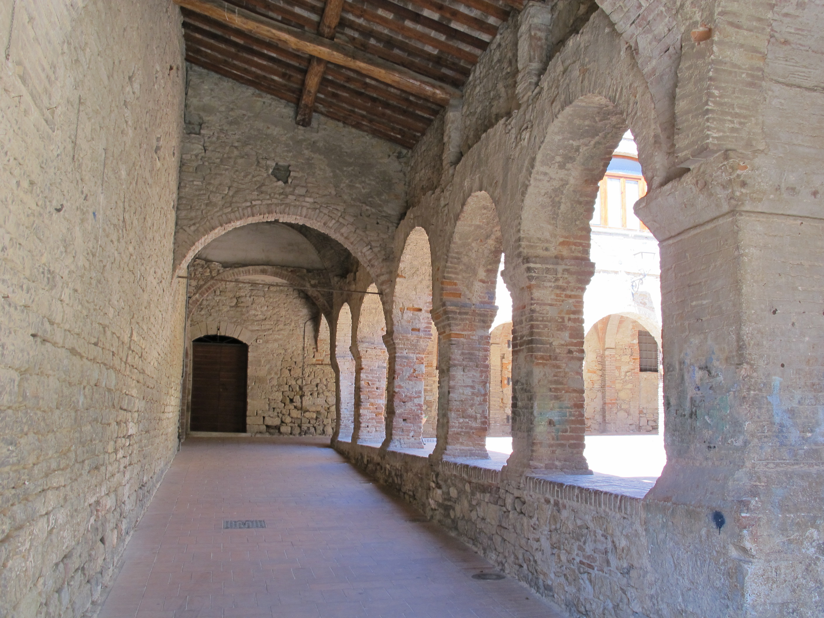 Suvereto, chiostro di san francesco